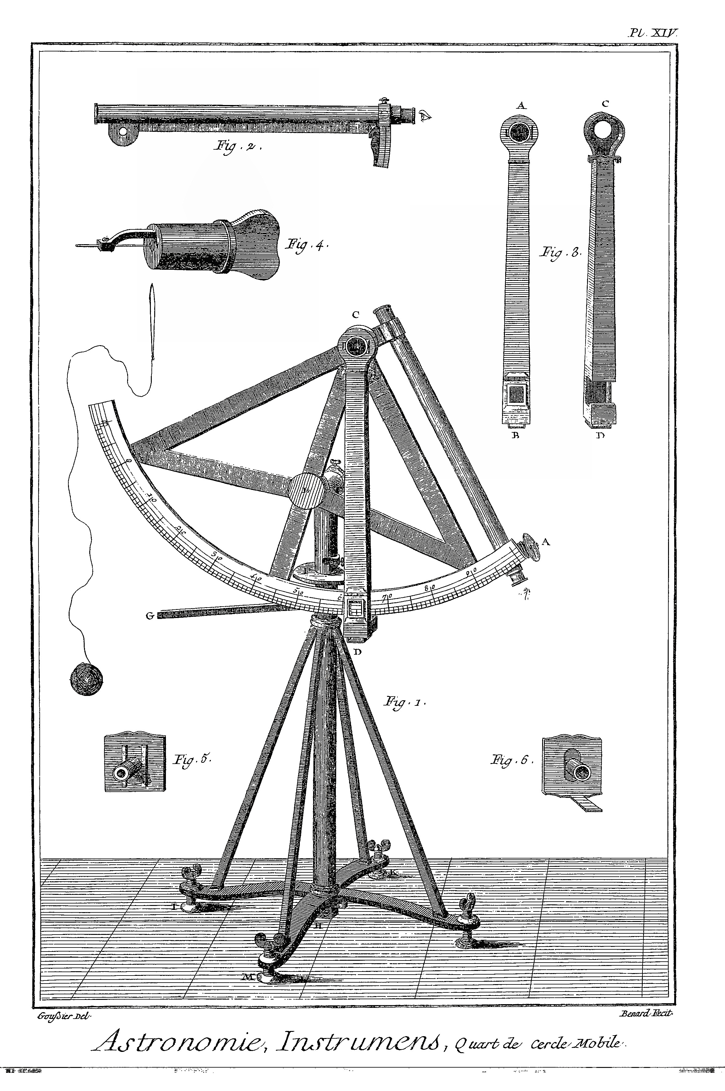 Quart de cercle à une lunette ; voir détails